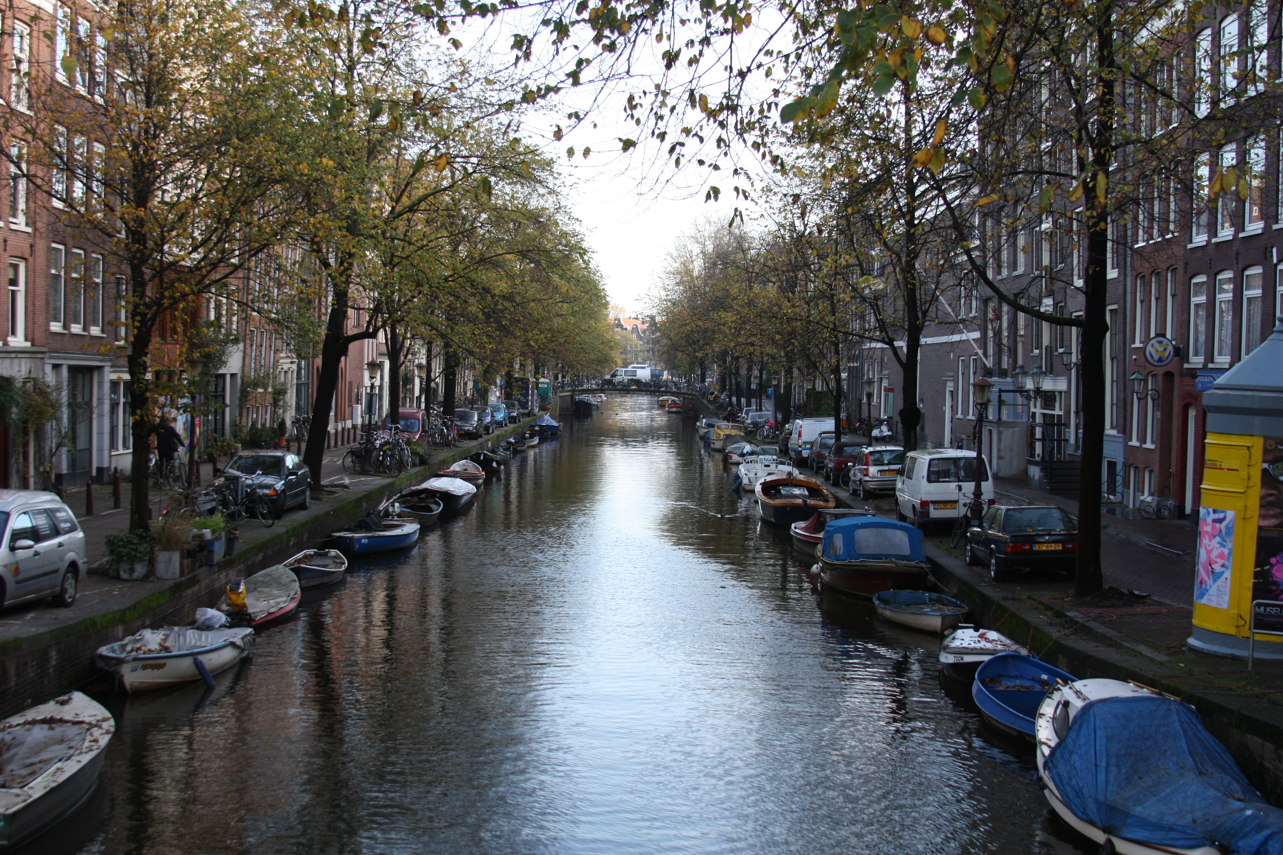 Amsterdam Zentrum